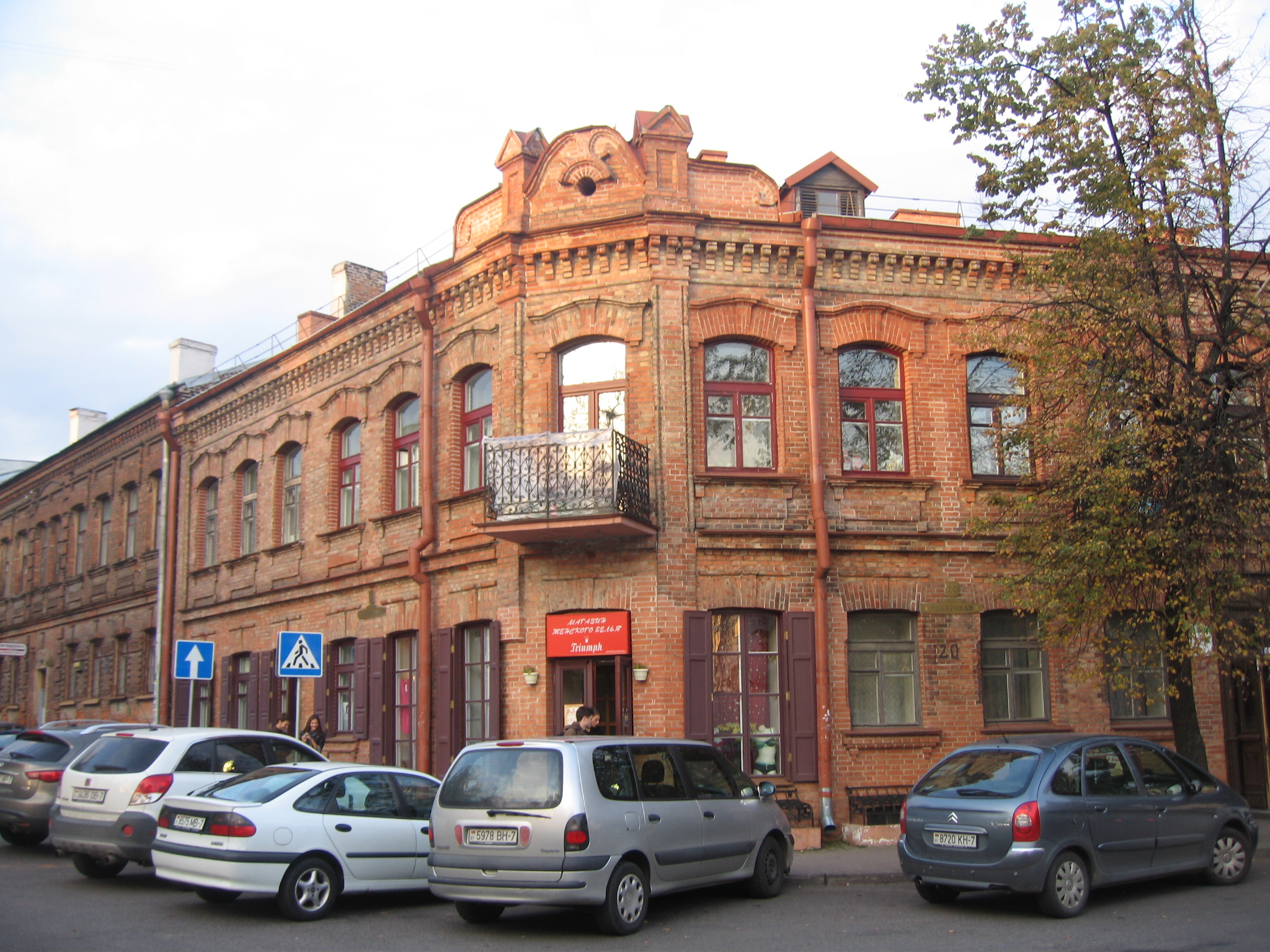 Беларуская (тарашкевіца): Гістарычны цэнтар г. Менску: будынкі і збудаваньні, пляніровачная структура, ляндшафт і культурны пласт. г. Менск This is a photo of Belarusian heritage monument. Reference number: 711Е000001 ( WLM)